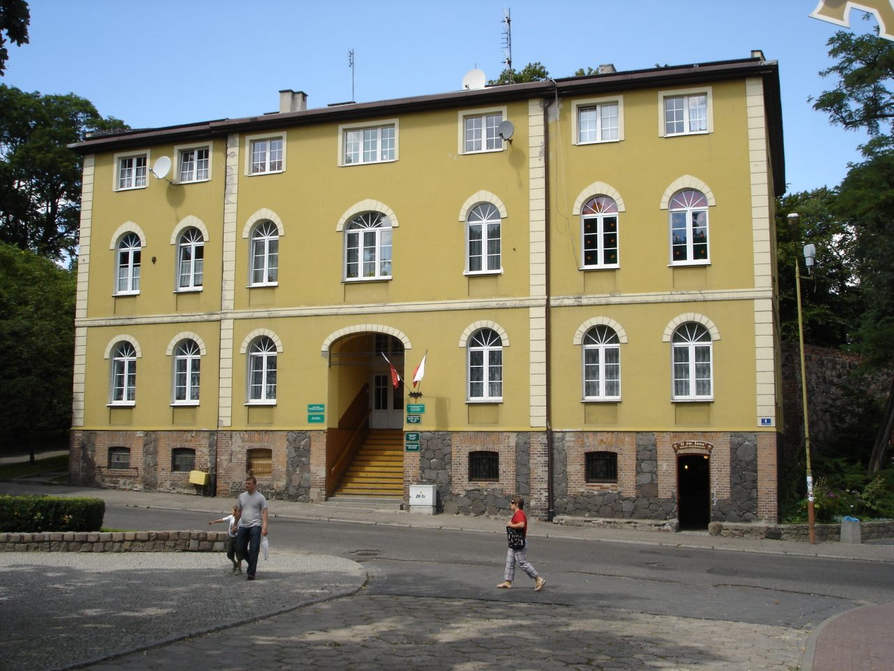 Dom zakonny - plebania Kościoła św. Jana w Stargardzie